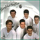 A Banchieri Énekegyüttes 1999-es CD lemeze